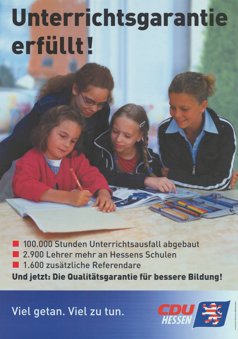 Unterrichtsgarantie erfüllt! 100.000 Stunden Unterrichtsausfall abgebaut 2.900 Lehrer mehr an Hessens Schulen 1.600 zusätzliche Referendare Und jetzt: Die Qualitätsgarantie für bessere Bildung! Viel getan. Viel zu tun. CDU Hessen Abbildung: Kinder beim Unterricht - Hessischer Löwe Plakatart: Motiv-/Textplakat Auftraggeber: Verantw.: CDU Hessen, Wiesbaden Objekt-Signatur: 10-007 : 1605 Bestand: Landtagswahlplakate Hessen (10-007) GliederungBestand10-18: Landtagswahlplakate Hessen (10-007) » CDU Lizenz: KAS/ACDP 10-007 : 1605 CC-BY-SA 3.0 DE